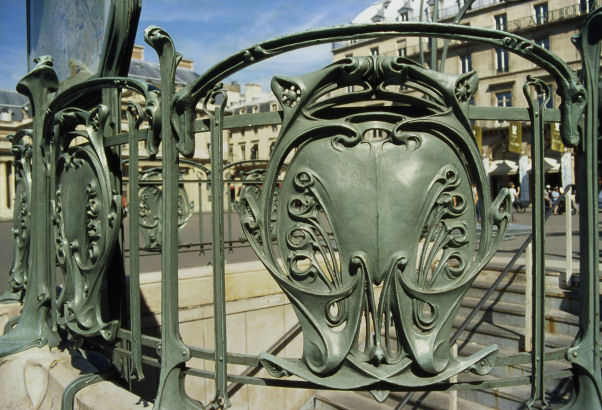 aut. : Utilisateur:Olivier Bost Palais-Royal - Musée du Louvre